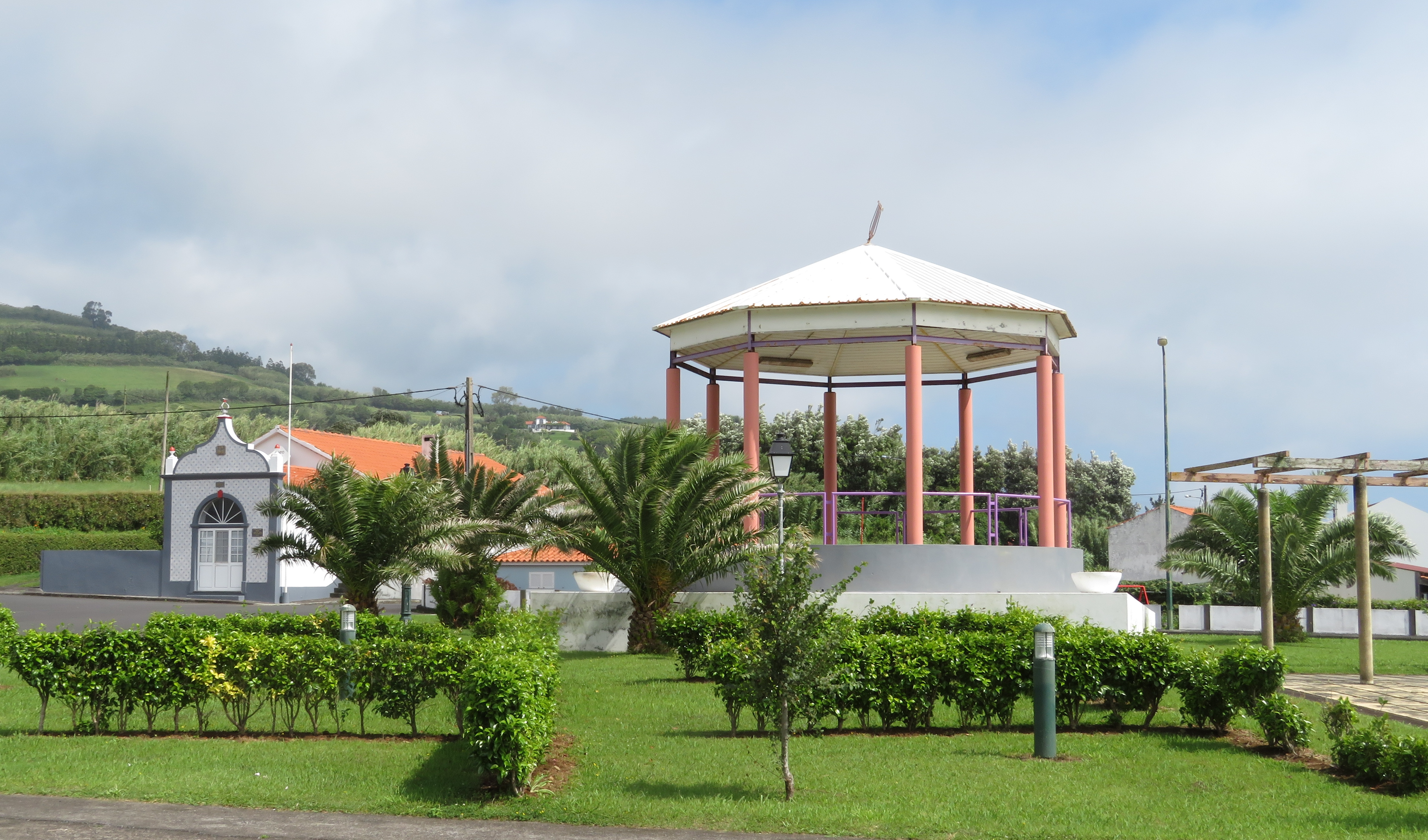 Jardim com Império da Trindade, Praia do Almoxarife, ilha do Faial, Acores, Portugal